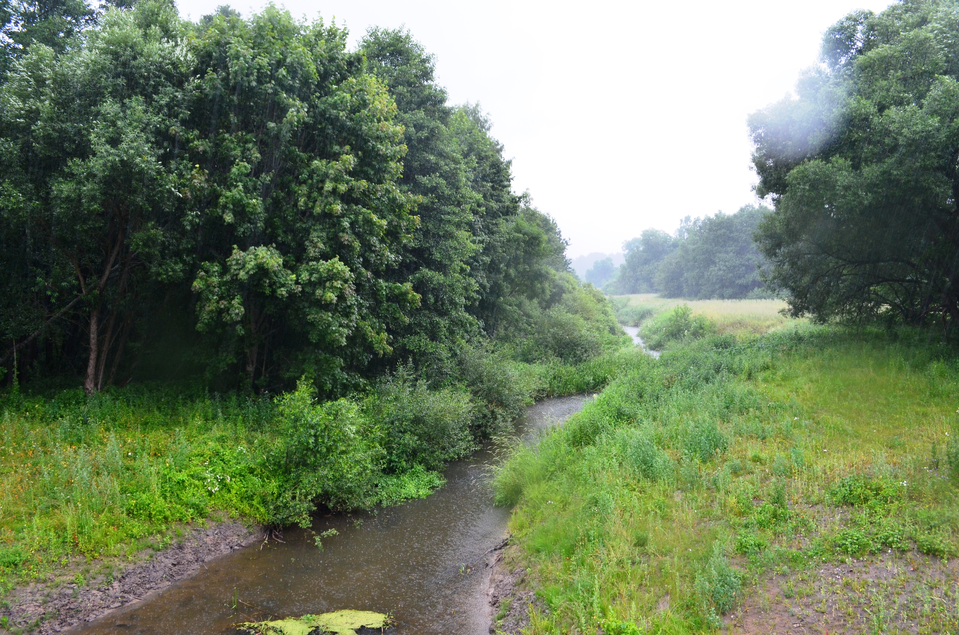 Vilka prie Anužių, Pagėgių sav.